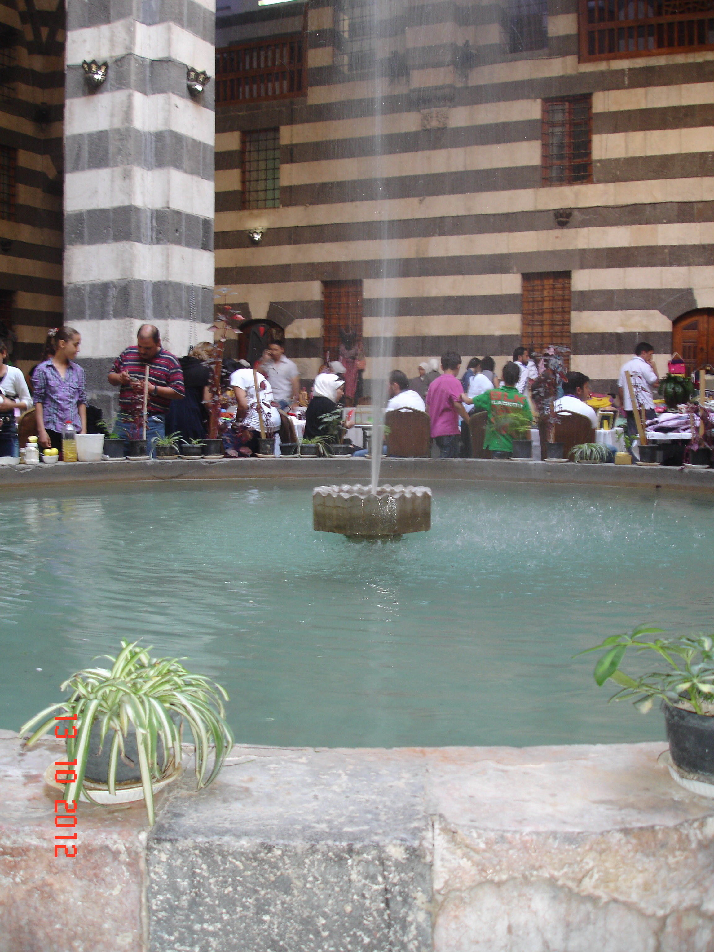 خان اسعد باشا